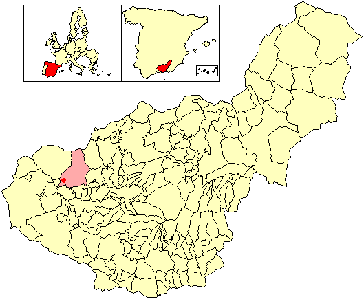 Situación de la localidad de Tocón (en el municipio de Íllora) respecto a la provincia de Granada, en España.